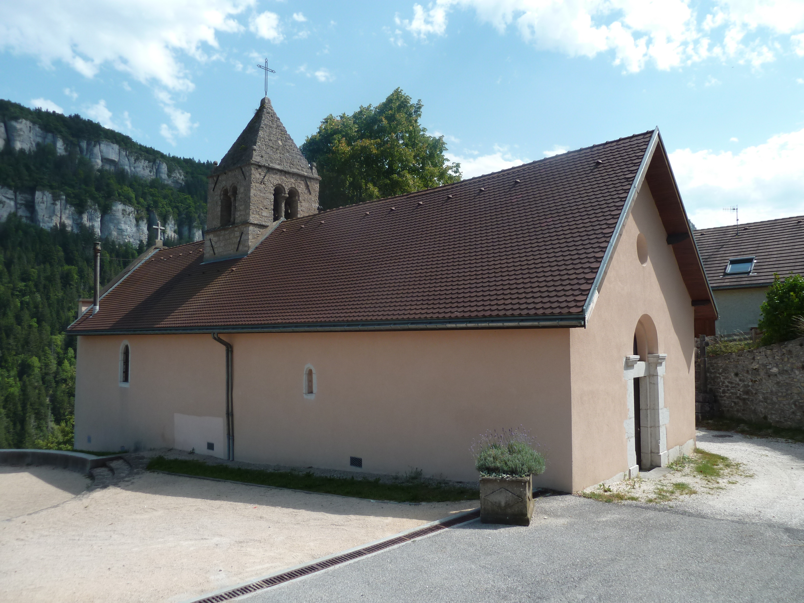 Engins (38) : L'église Saint-Jean-Baptiste.